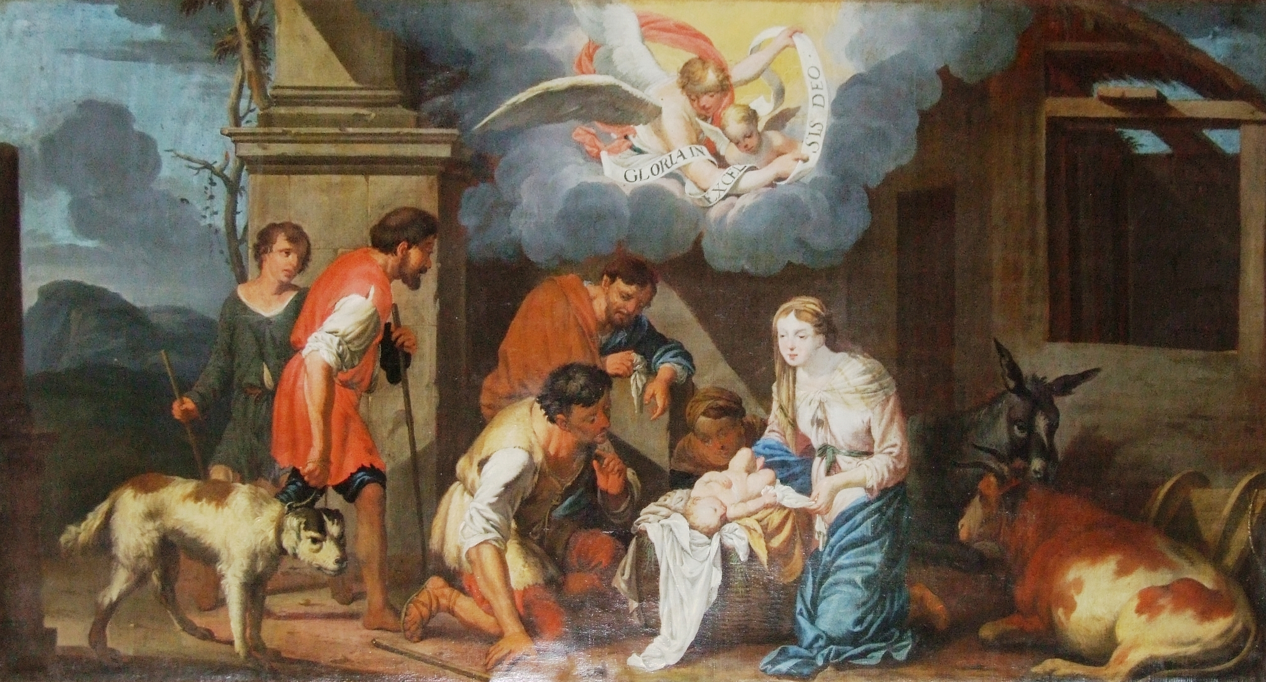 Ölbild in der Sakristei der Kirche Unser Frauen zu Memmingen von Johann Friedrich Sichelbein